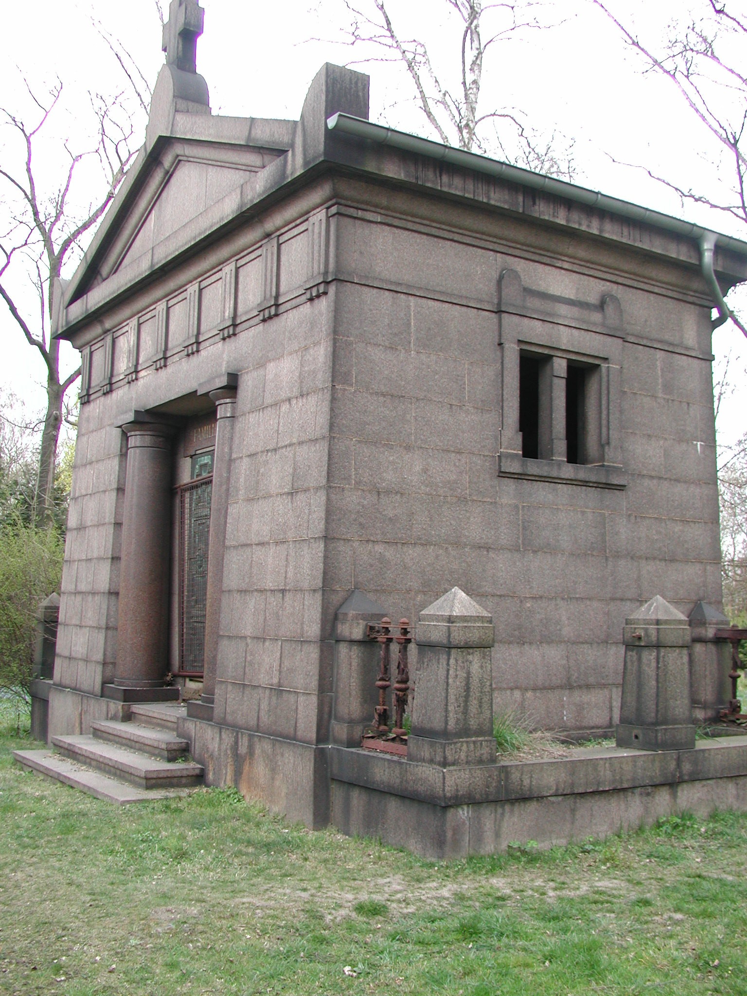 Mausoeleum der Familie Loeper auf dem eh. Friedhof Gotlindestraße